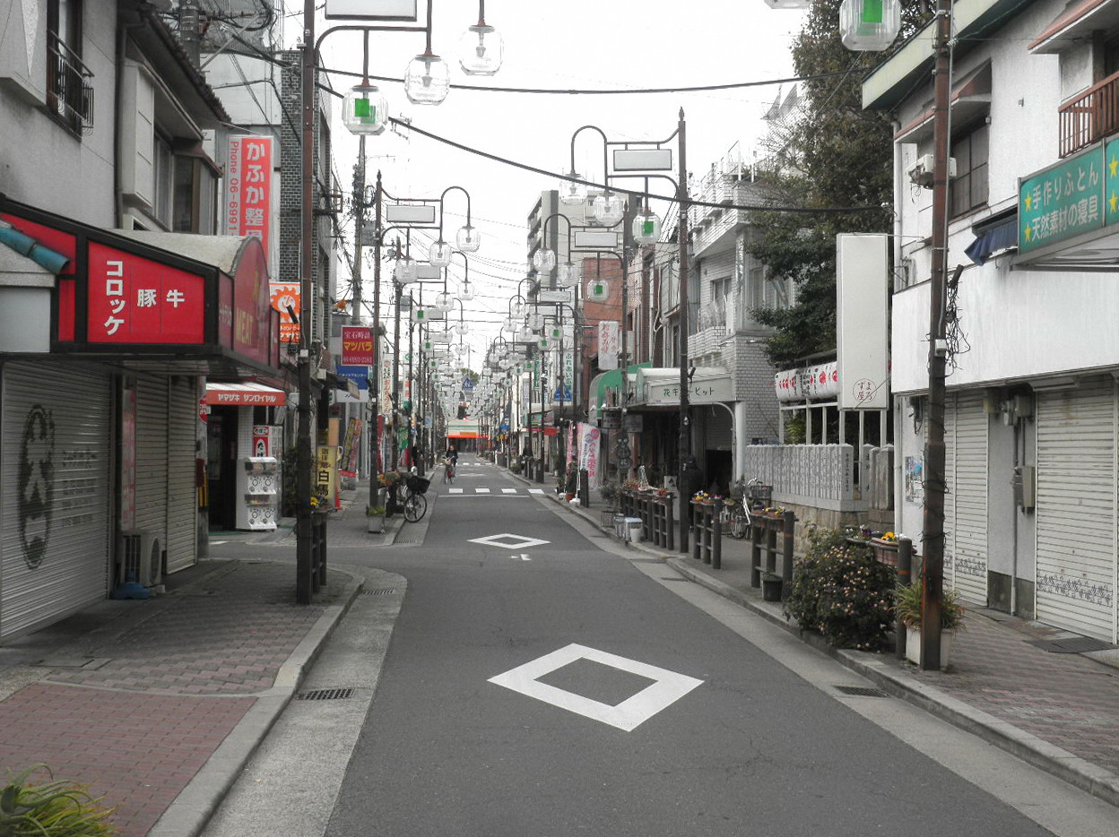 京阪土居駅南側の商店街